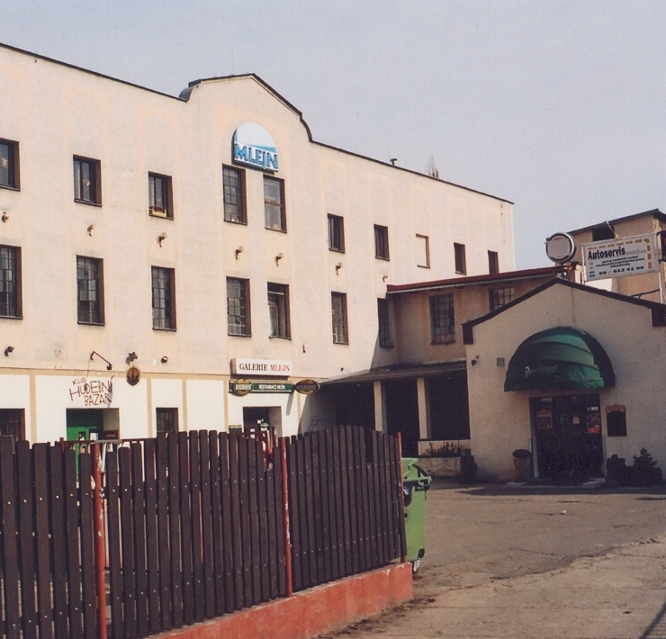 současný stav budovy bývalého krupného mlýna